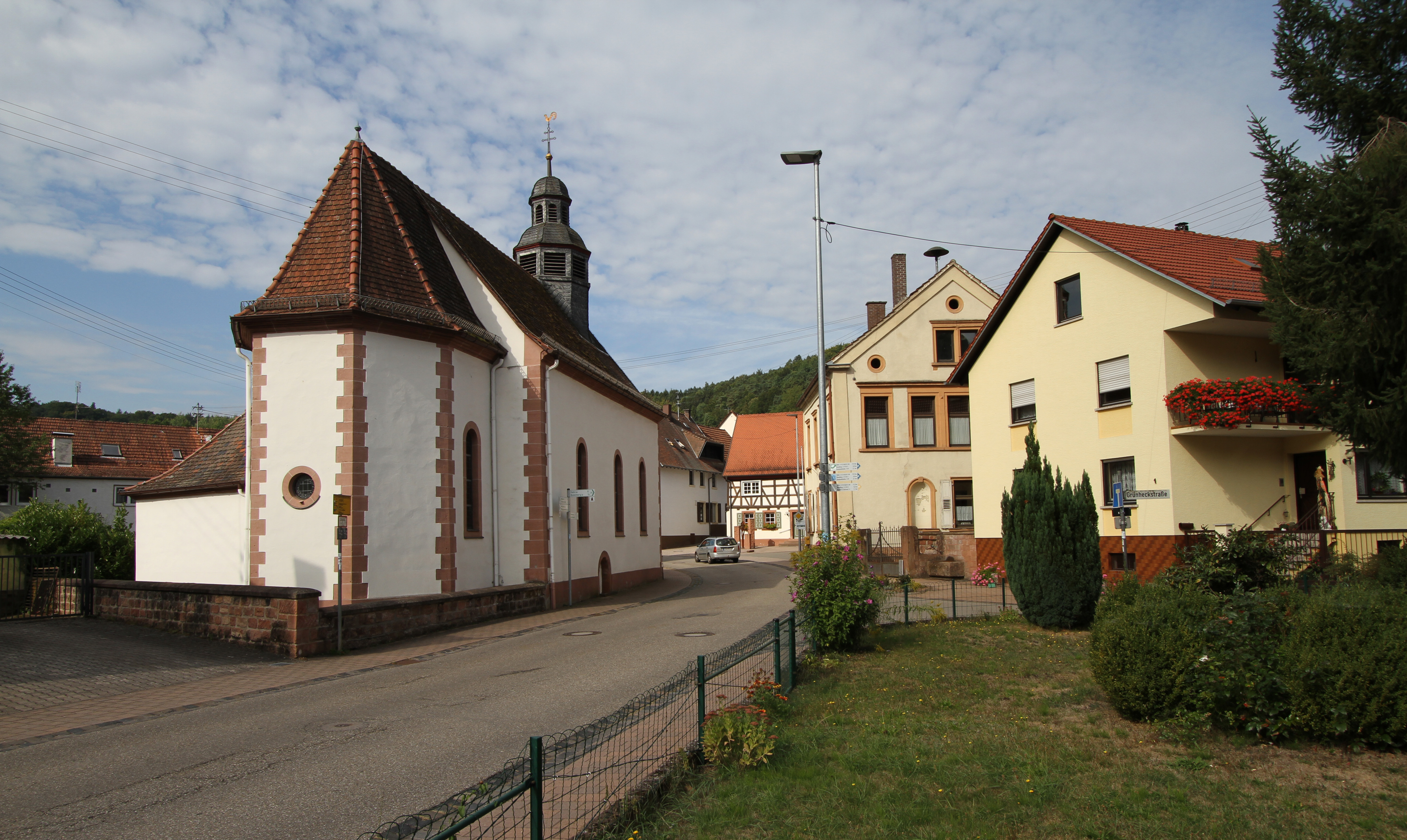 Erlenbach bei Dahn, Hauptstraße 11; katholische Kirche Mariä Himmelfahrt und St. Ägidius; neoromanischer Saalbau, 1900.